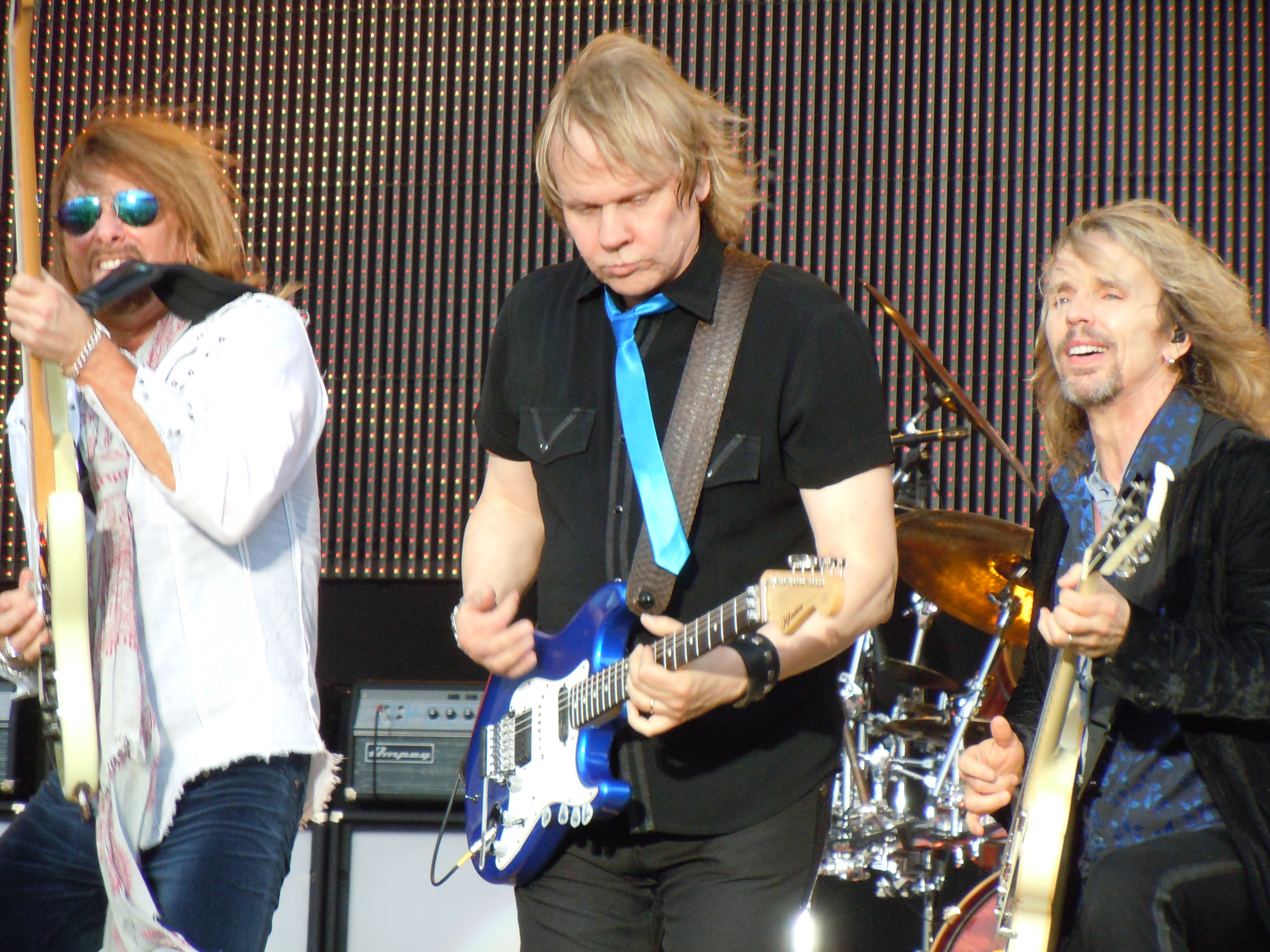 Styx in Omaha.